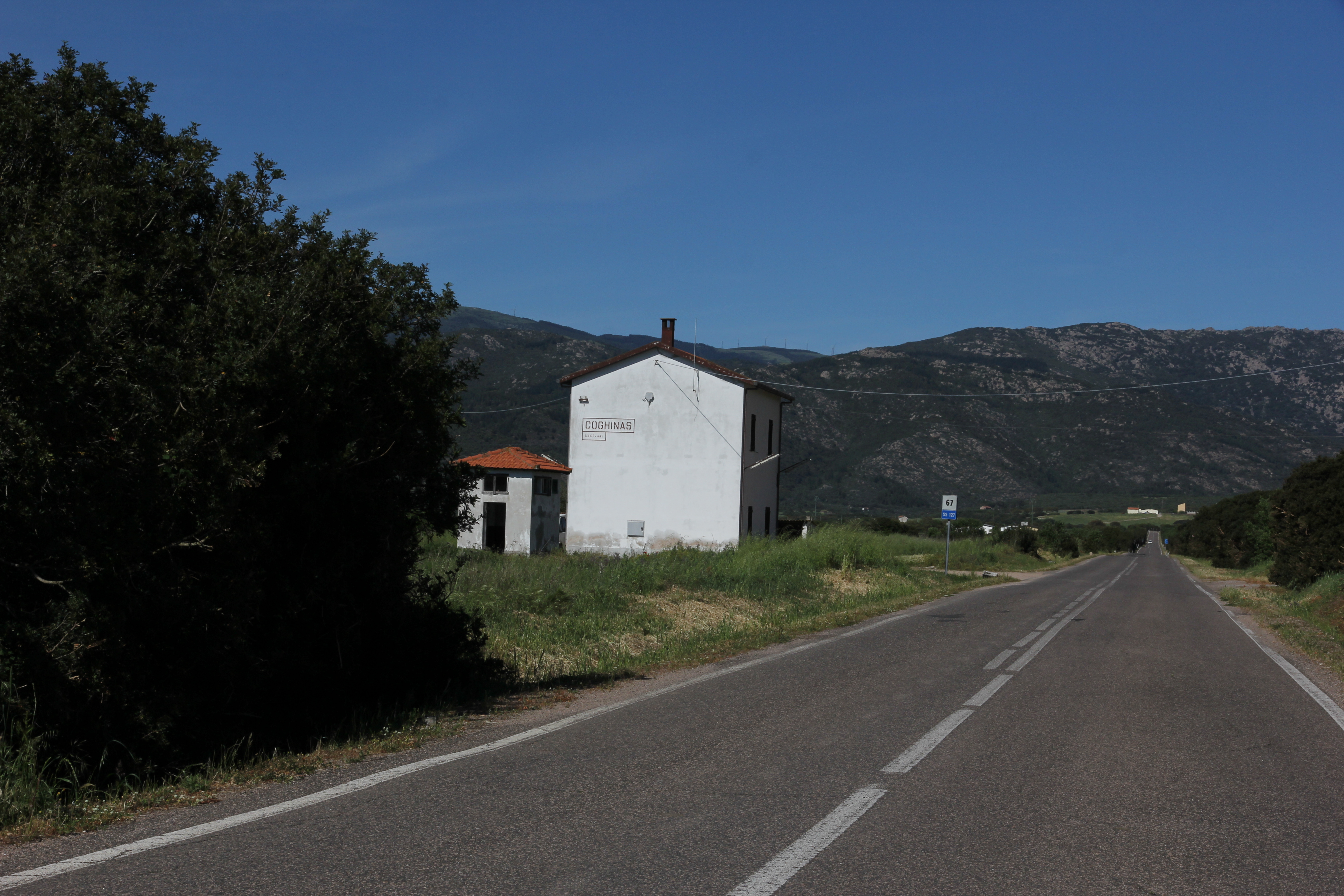 Perfugas, stazione ferroviaria di Coghinas - Ferrovia Sassari-Tempio-Palau